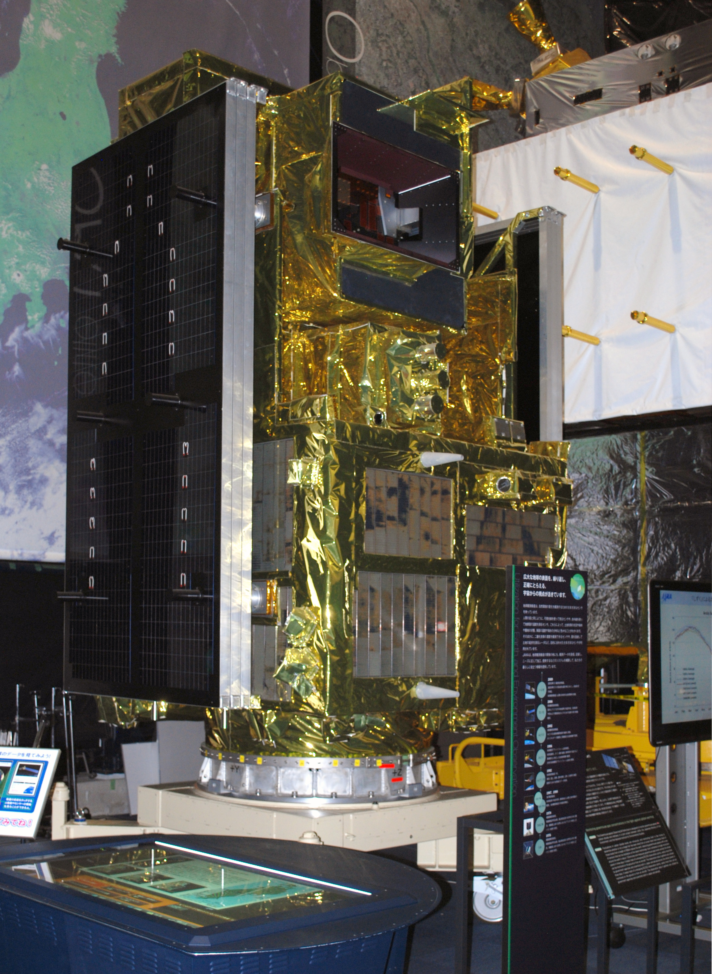 JAXA Greenhouse observing satellite